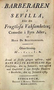 Titelblad till boken: Beaumarchais: Barberaren i Sevilla